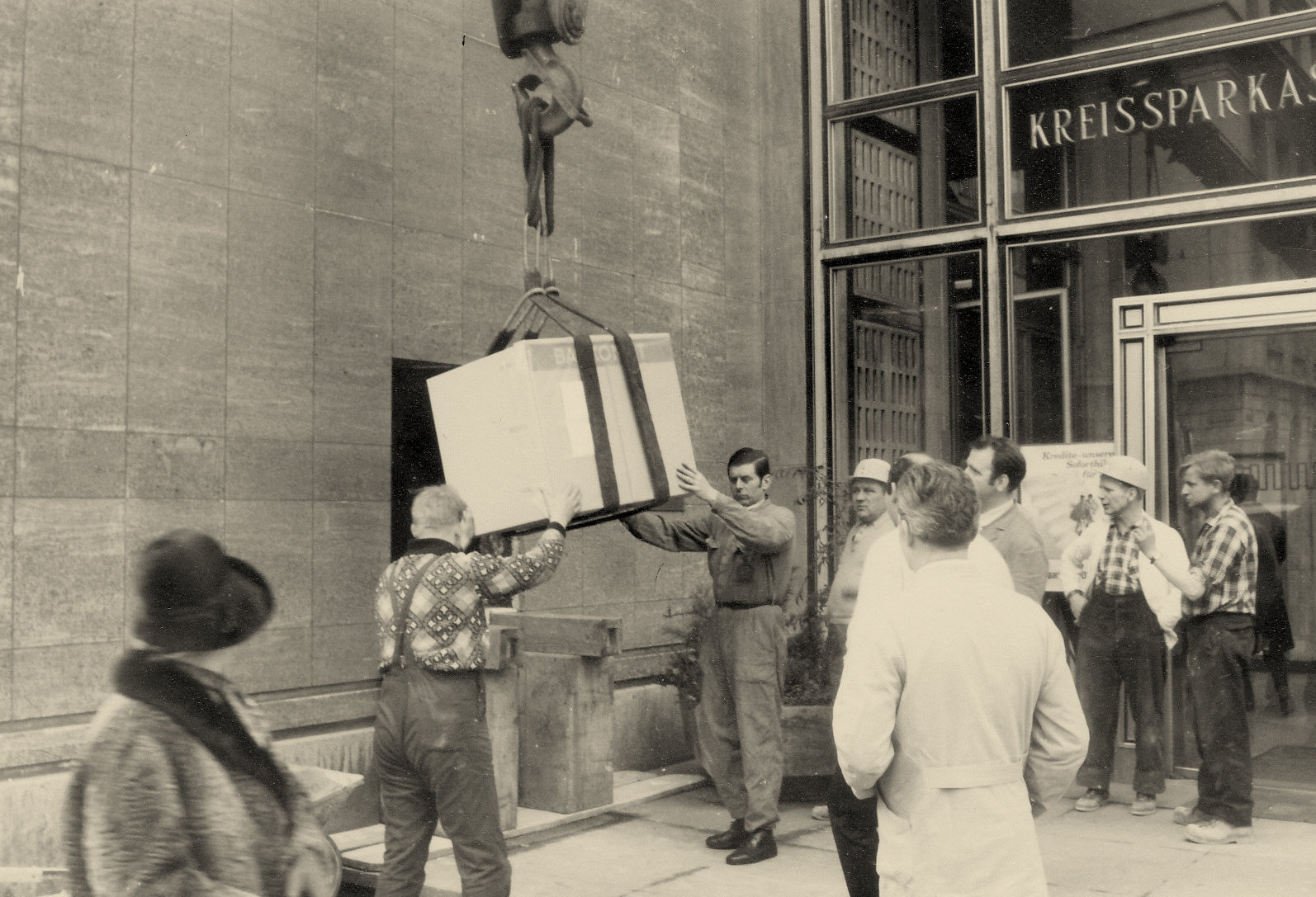 Aufbau des ersten Bankautomaten